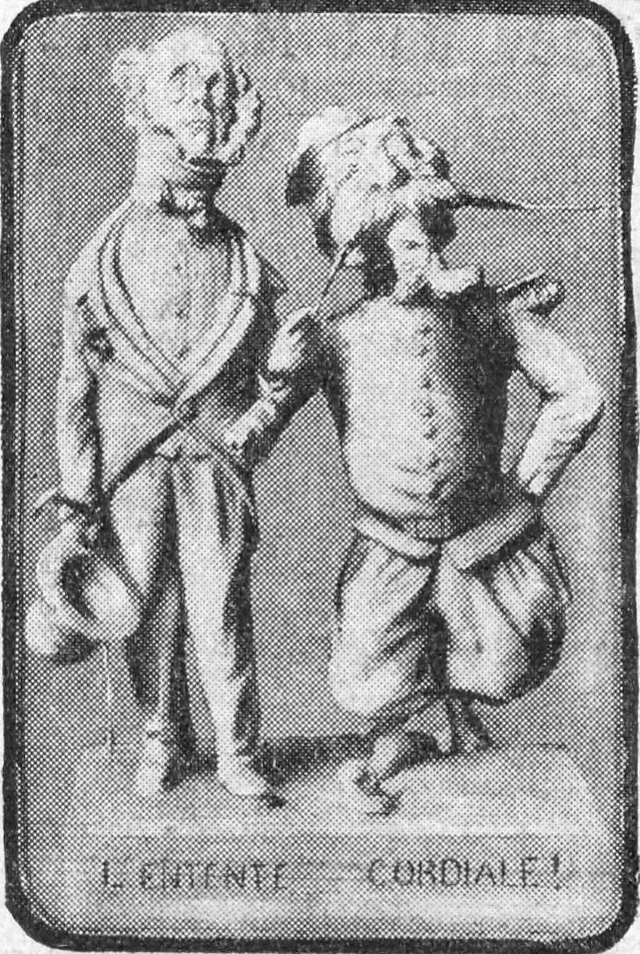 "L'Entente cordiale en caricature."